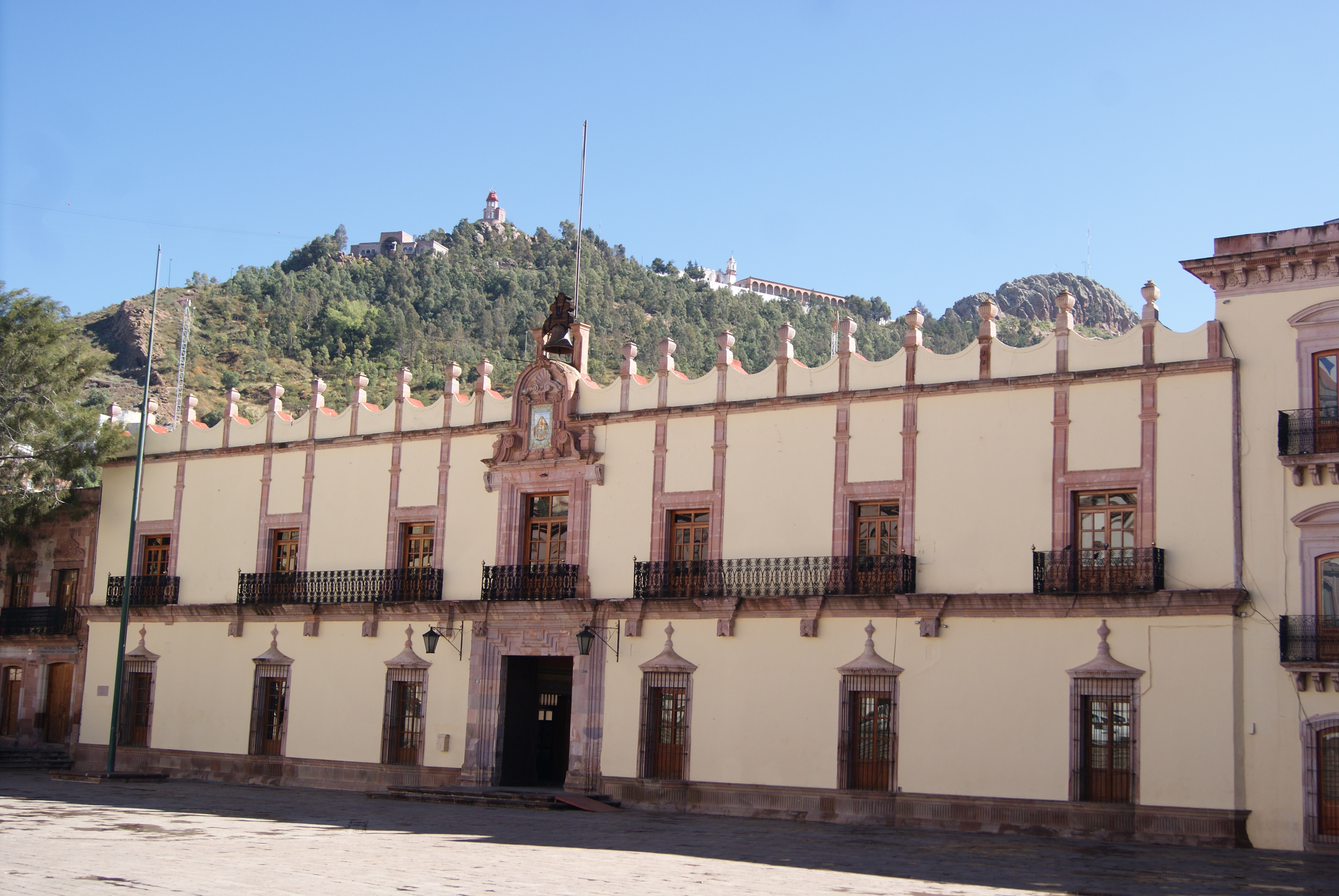 Palacio de Gobierno de Zacatecas con el Cerro de la Bufa al fondo